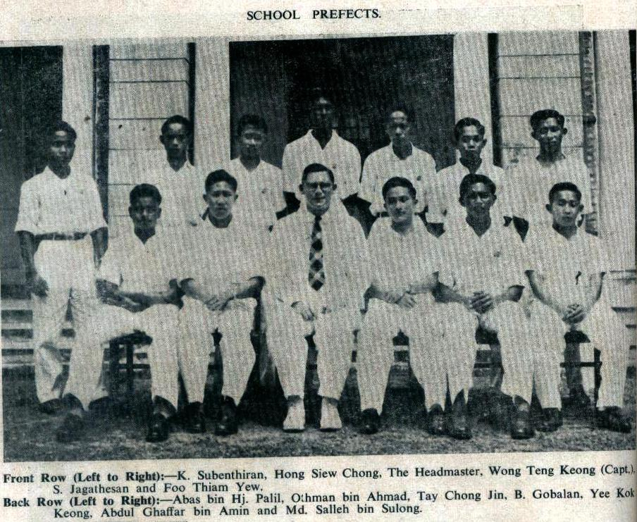 Pengawas, Maxwell School